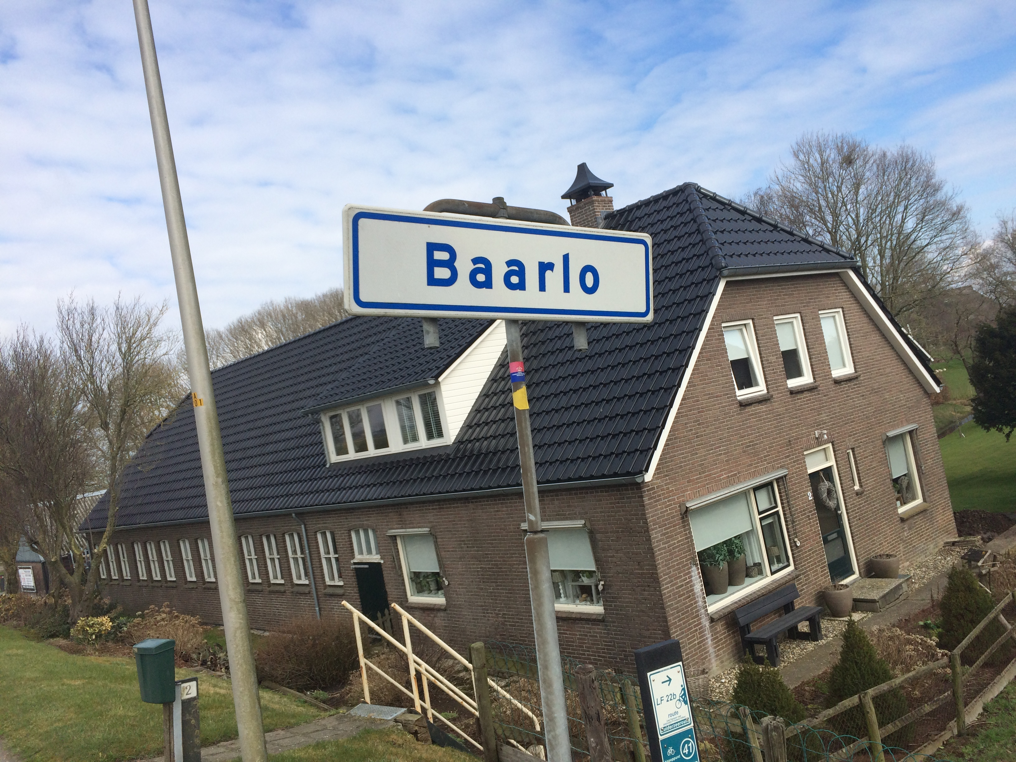 Plaatsnaambordje Baarlo.